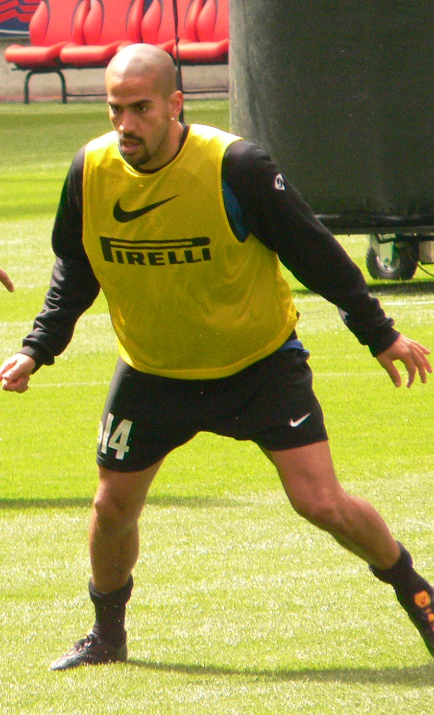 ×—×•× ×Ÿ ×¡×‘×¡×˜×™× ×Ÿ ×•×¨×•×Ÿ